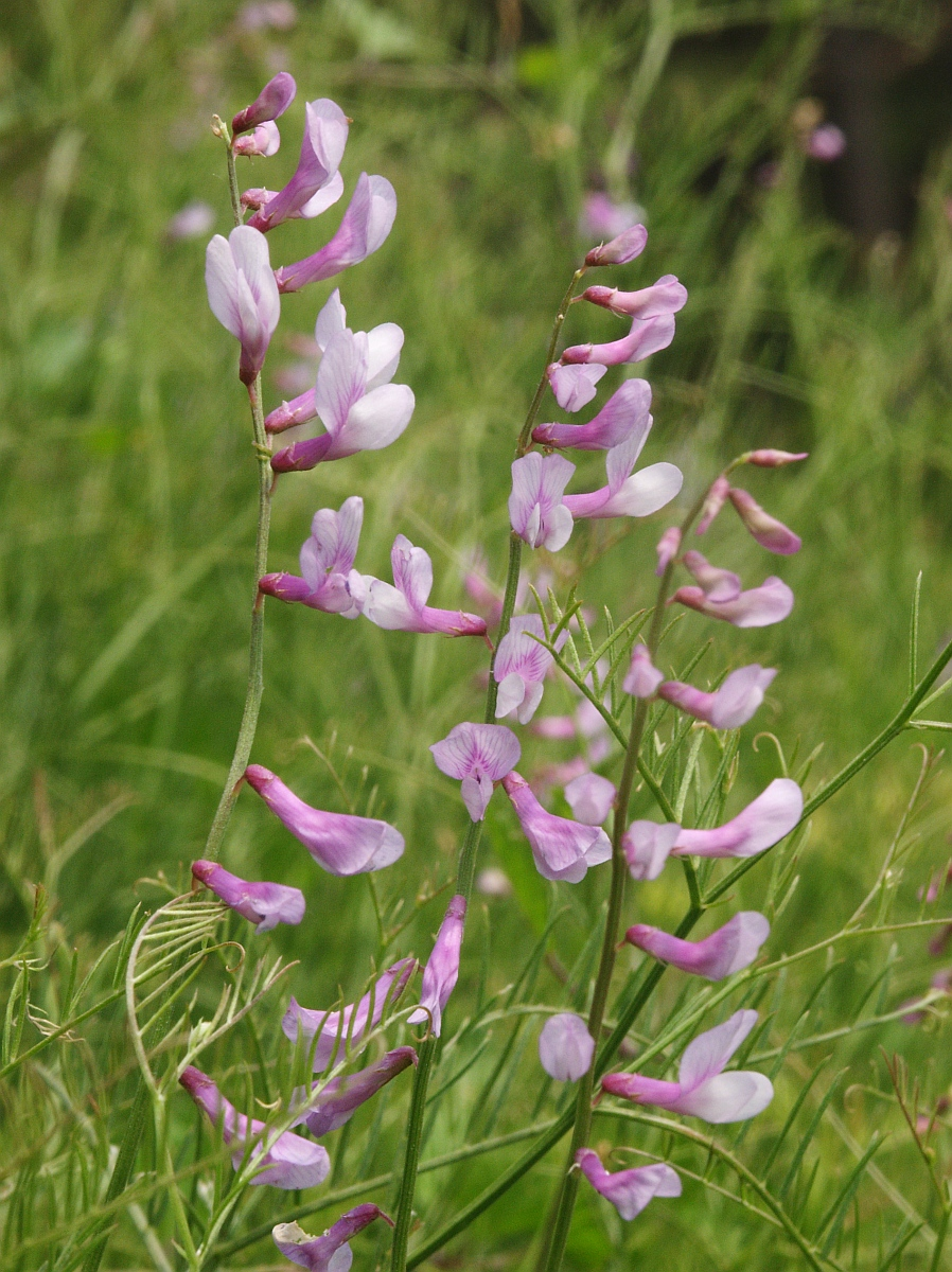 Vicia dalmatica, Tauberland, Germany